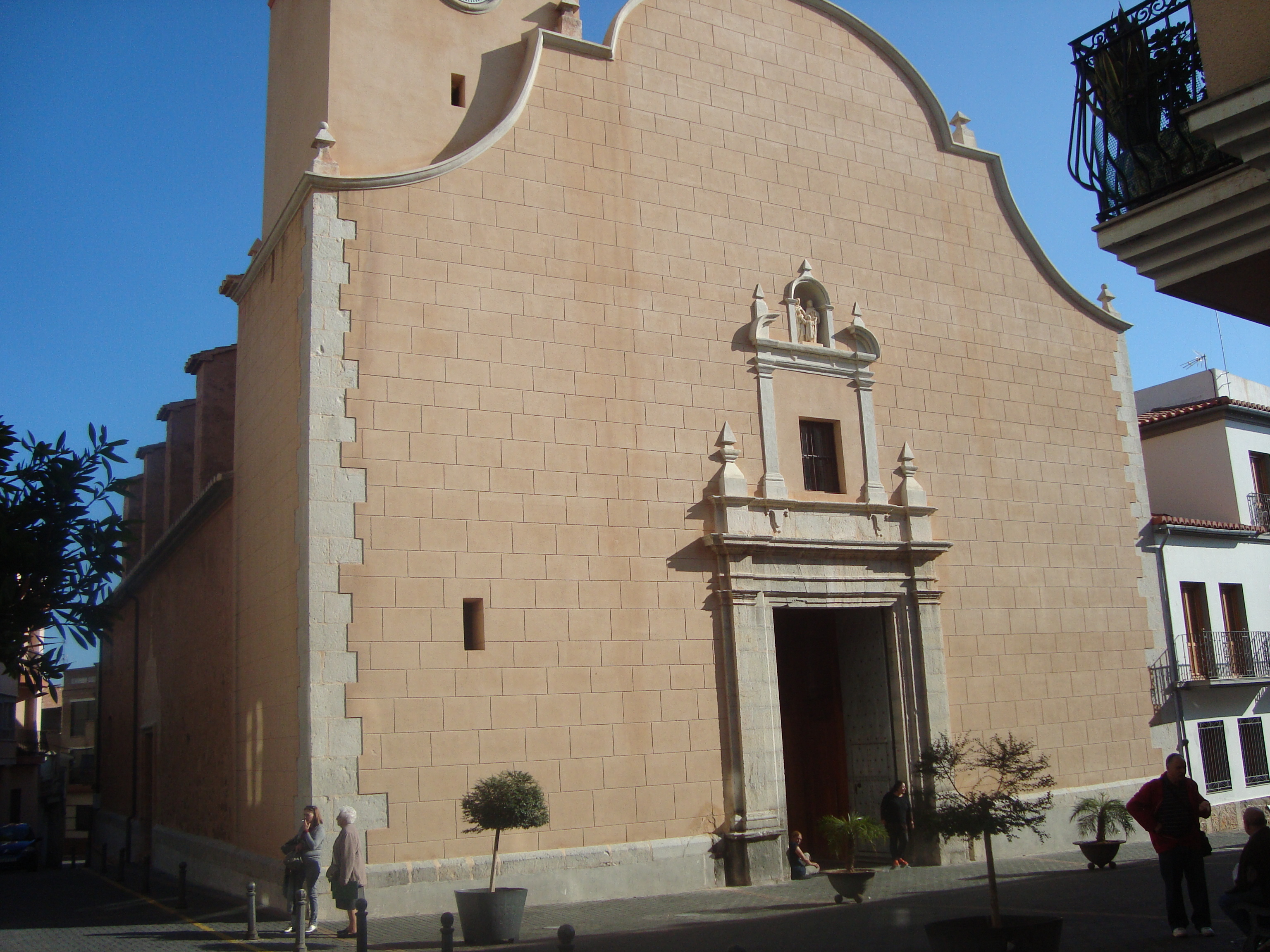 Església de la Sagrada Família (la Vilavella) 06.136-001.